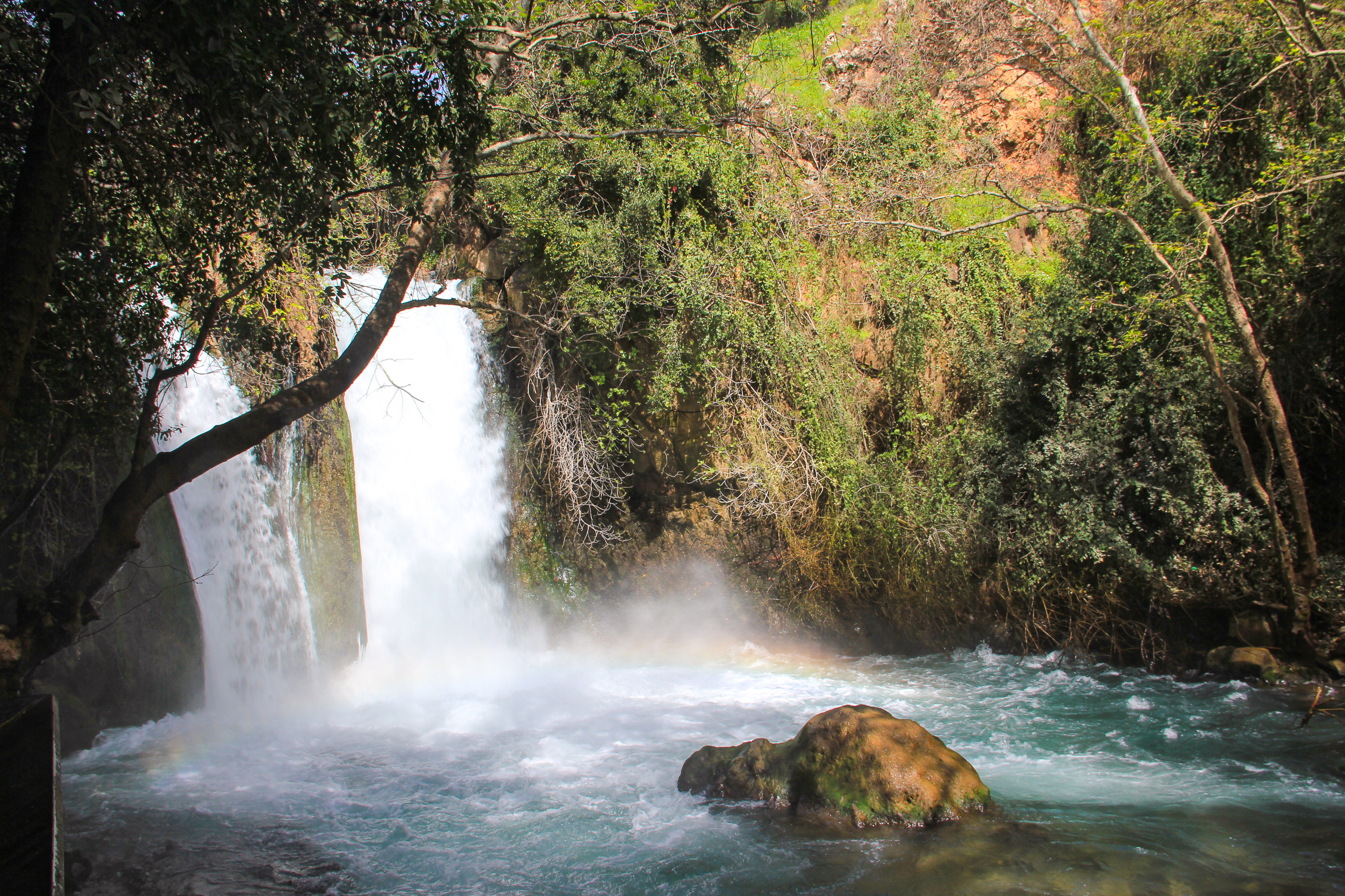 נַחַל חֶרְמוֹן (מכונה גם בָּנְיַאס, הגייה ערבית של השם הקדום פָנְיַאס - העיצור p אינו פונמה בשפה הערבית ולכן נעשה שימוש בעיצור b), הוא נחל איתן והוא המזרחי במקורות הירדן. כמות מימיו היא כרבע מכלל מי נהר הירדן.